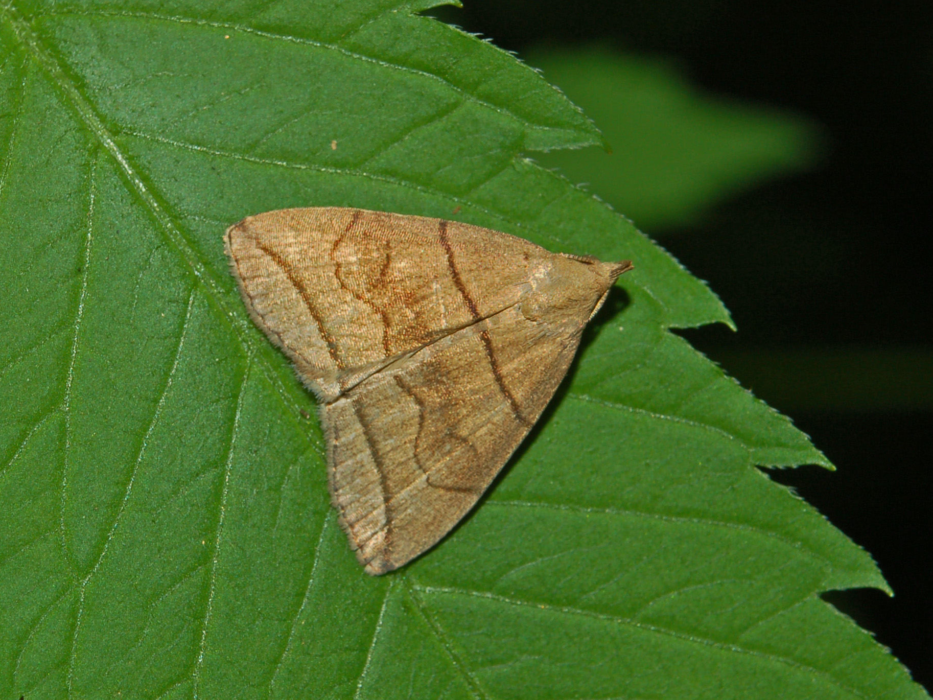 Herminea griseali.